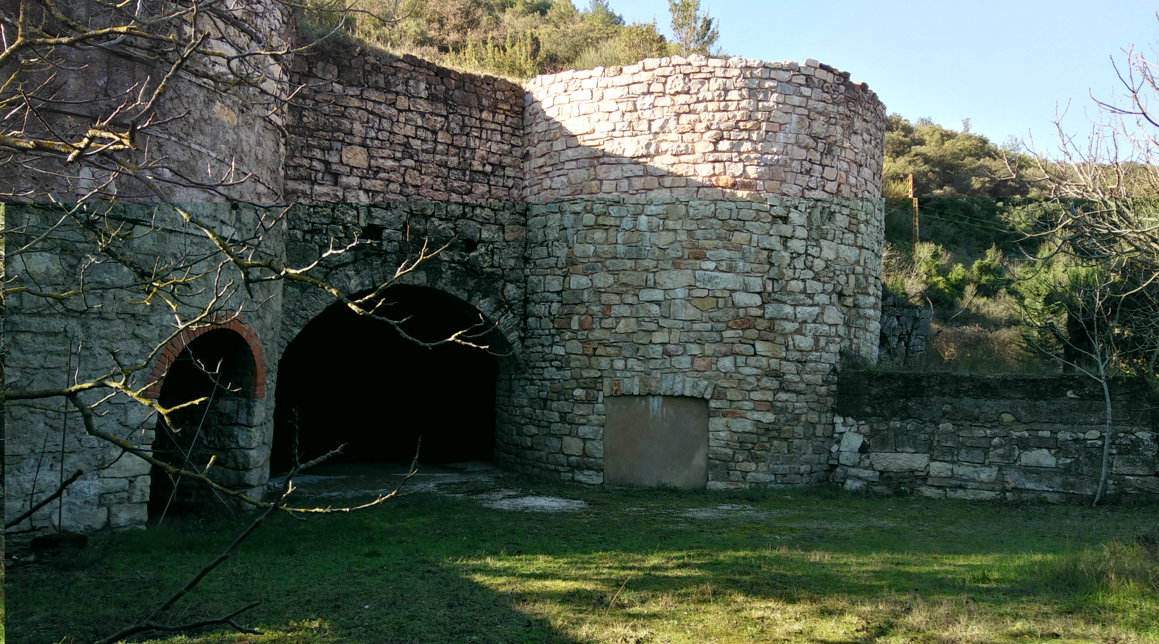 La façade des fours et l'entrée de la halle voûtée